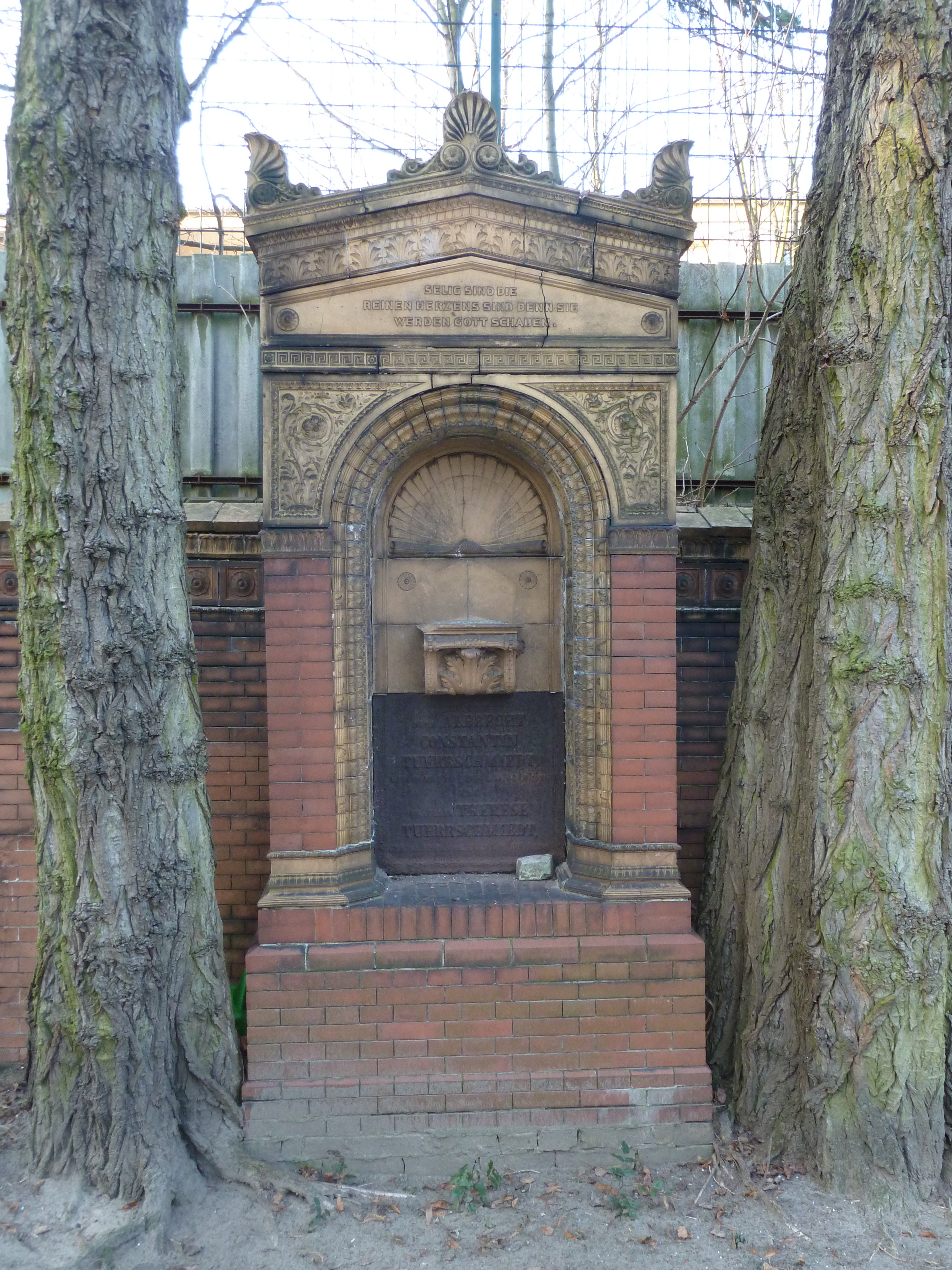 Grab des Bauingenieurs Albrecht Türrschmiedt auf dem Dom-Friedhof in Berlin-Wedding, Baudenkmal.